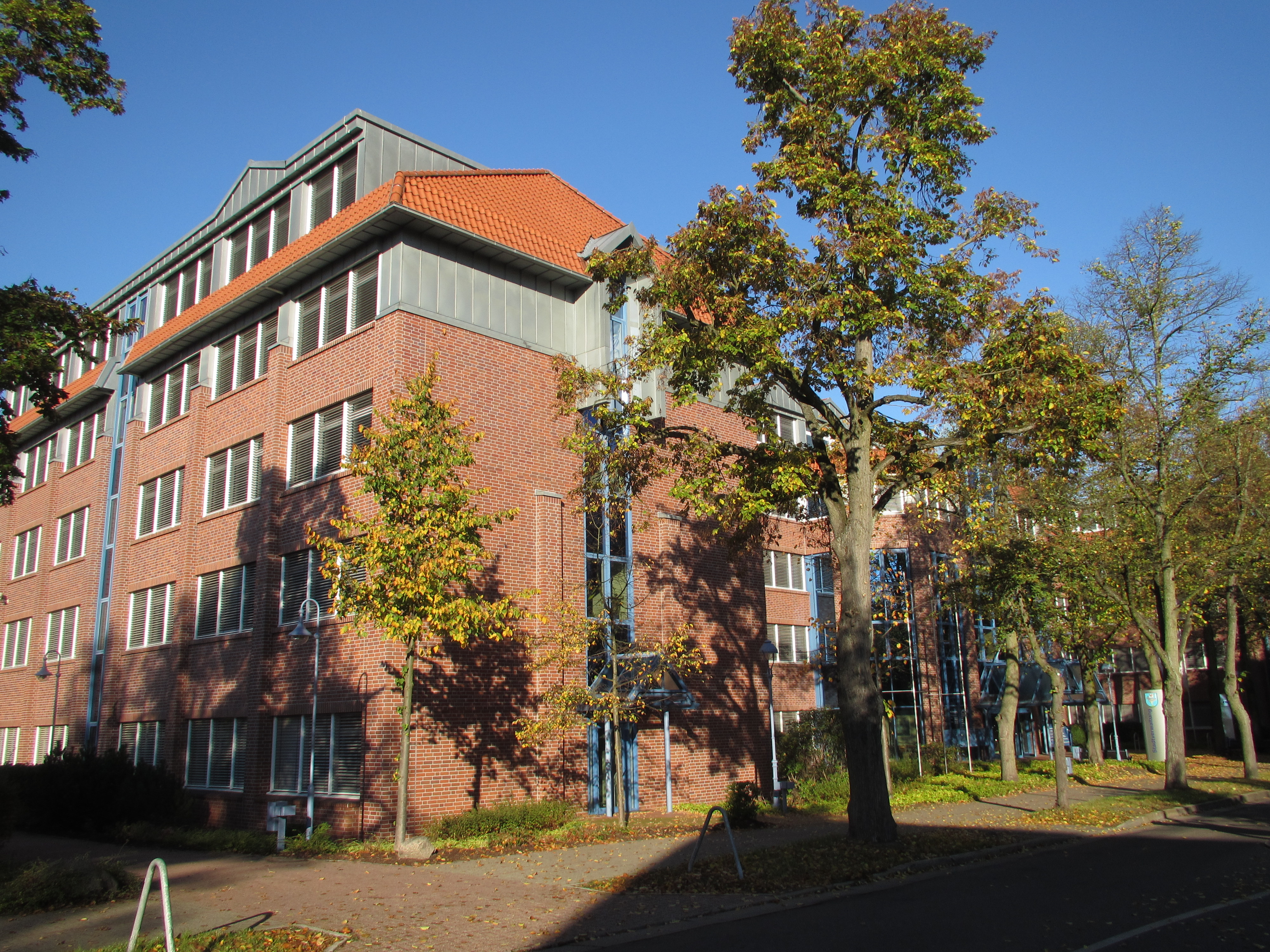 Strausberg Stadtansichten Sitz der Stadtverwaltung Strausberg Hegermühlenstraße 58